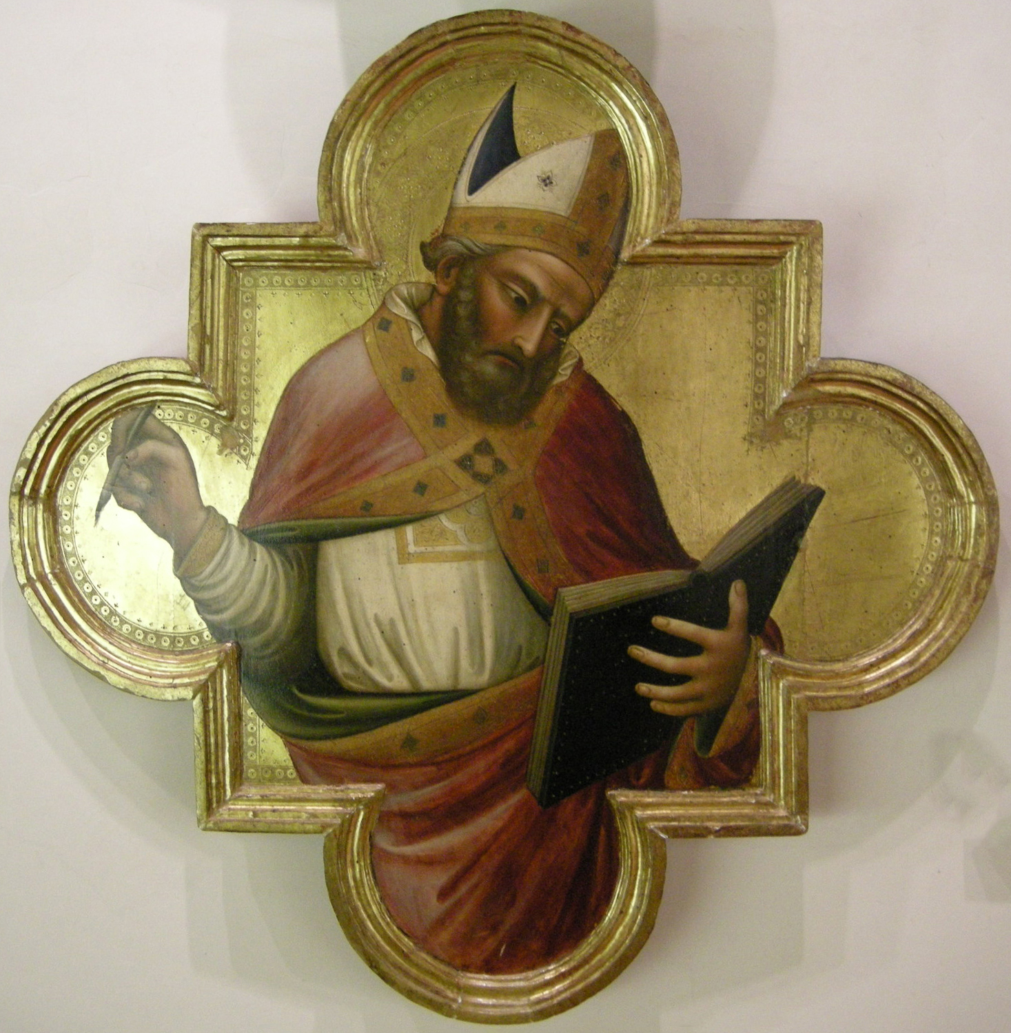 Dottore della chiesa